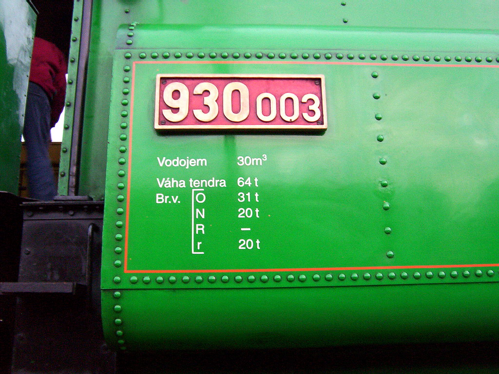 Tendr lokomotivy 486.007 s označením 930.003